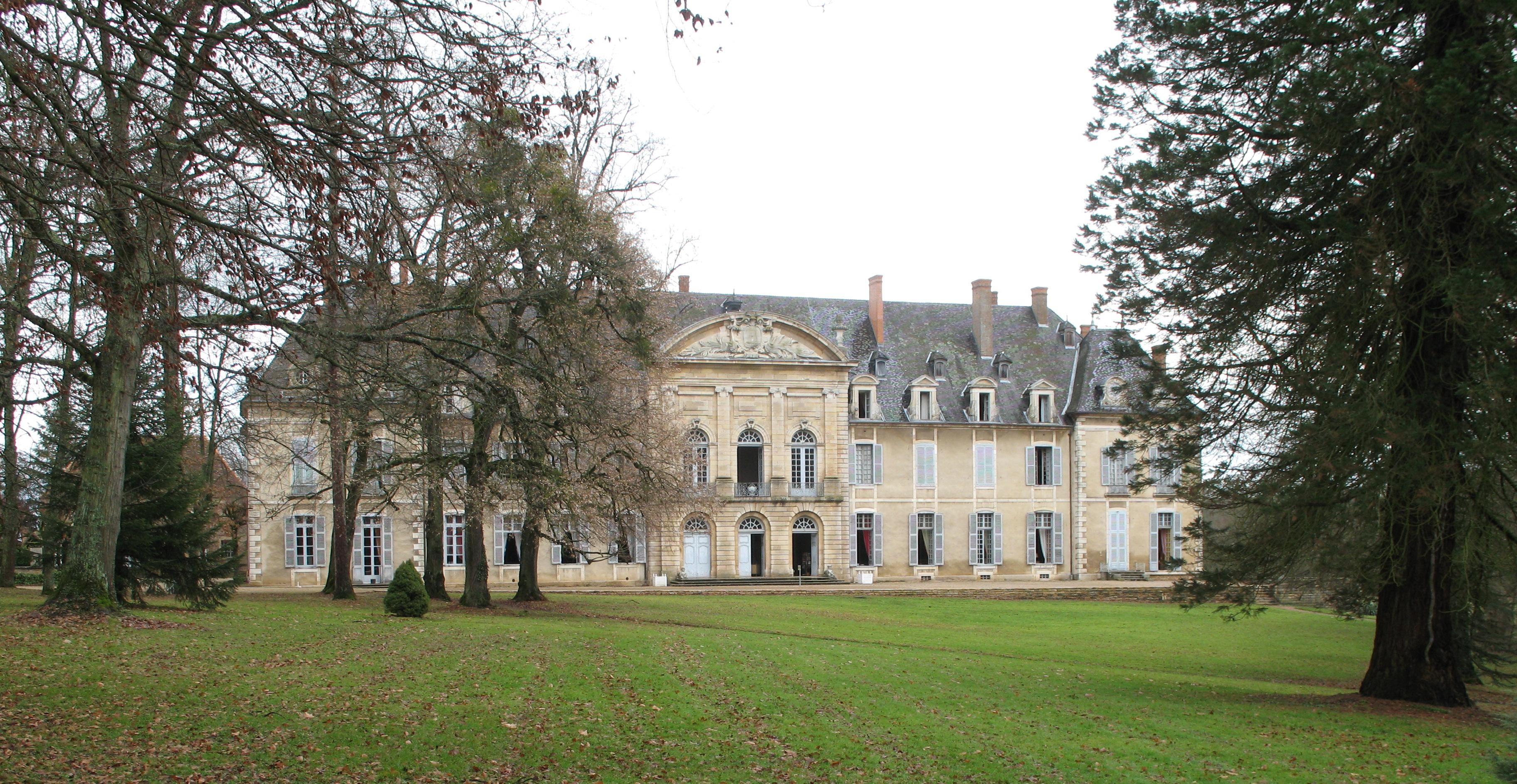 château de la Ferté - Saint-Ambreuil (Saône-et-Loire)